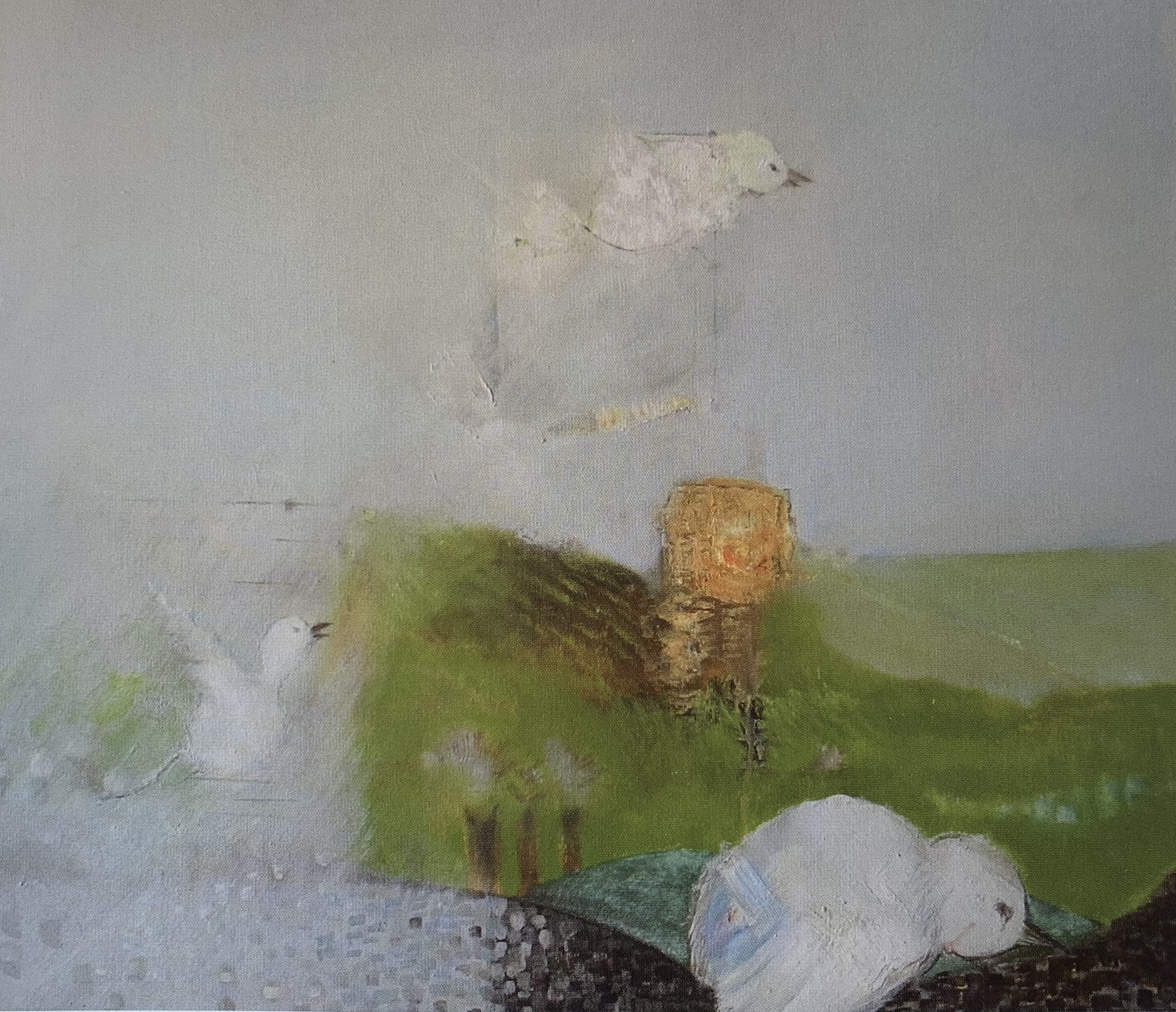 Solitudine